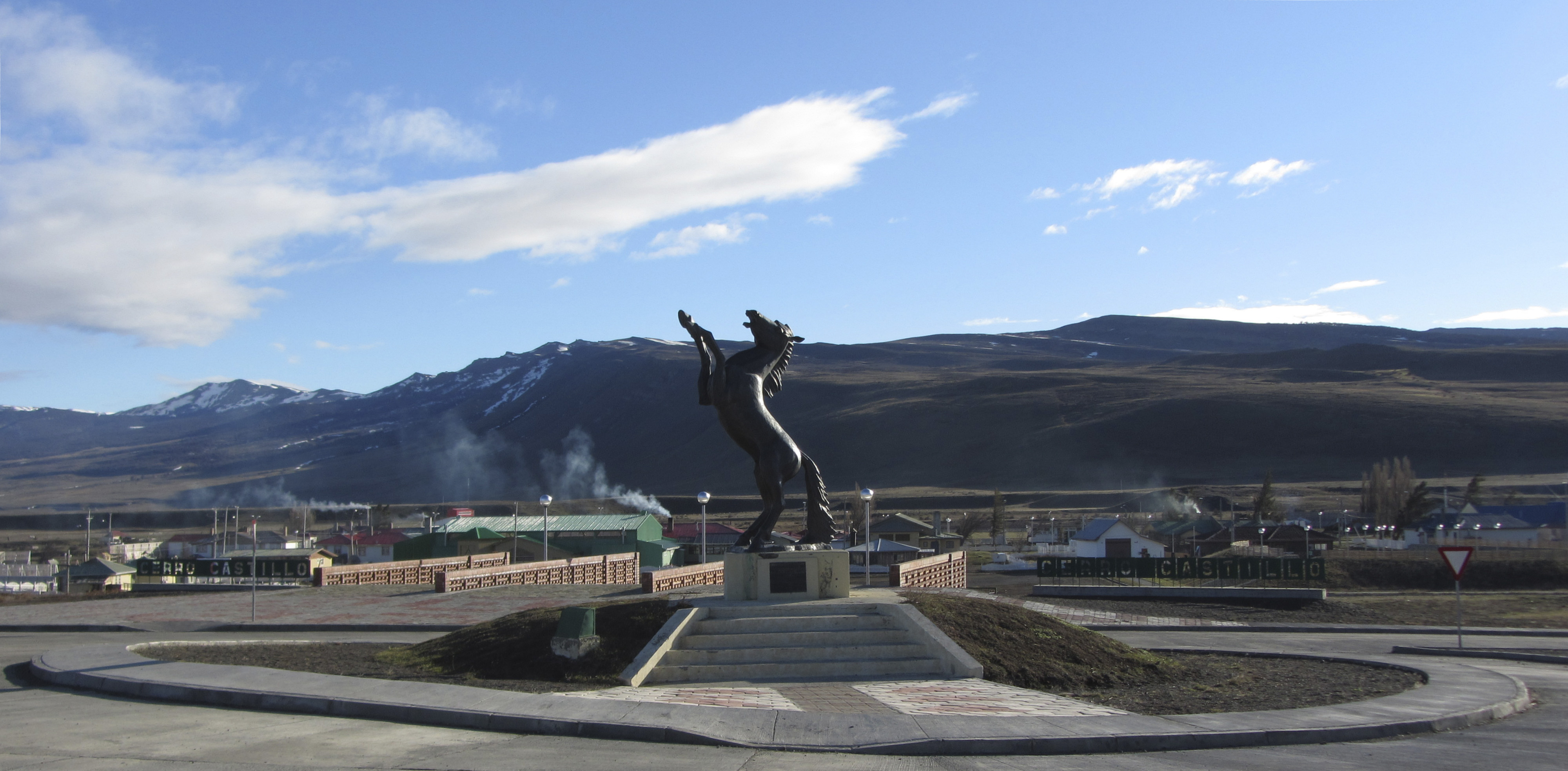 Cerro Castillo, capital de comuna Torres del Paine. Región de Magallanes y de la Antártica Chilena, Chile. Agosto de 2012.